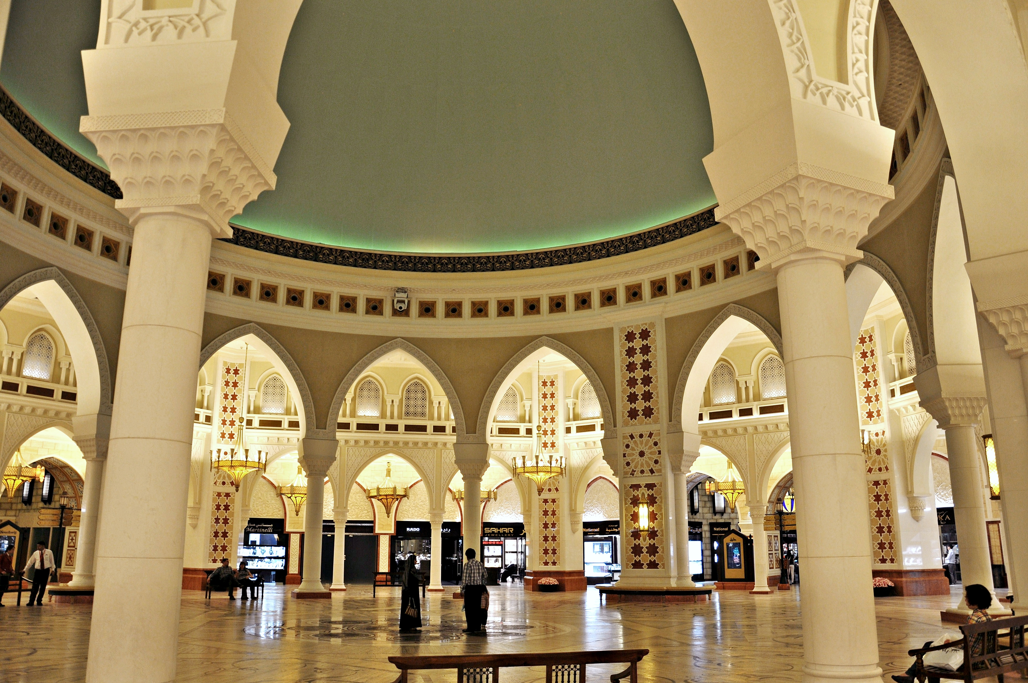 emiratos arabes